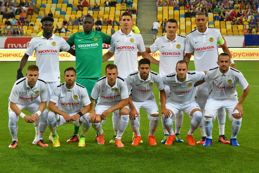 BSC Young Boys 2016